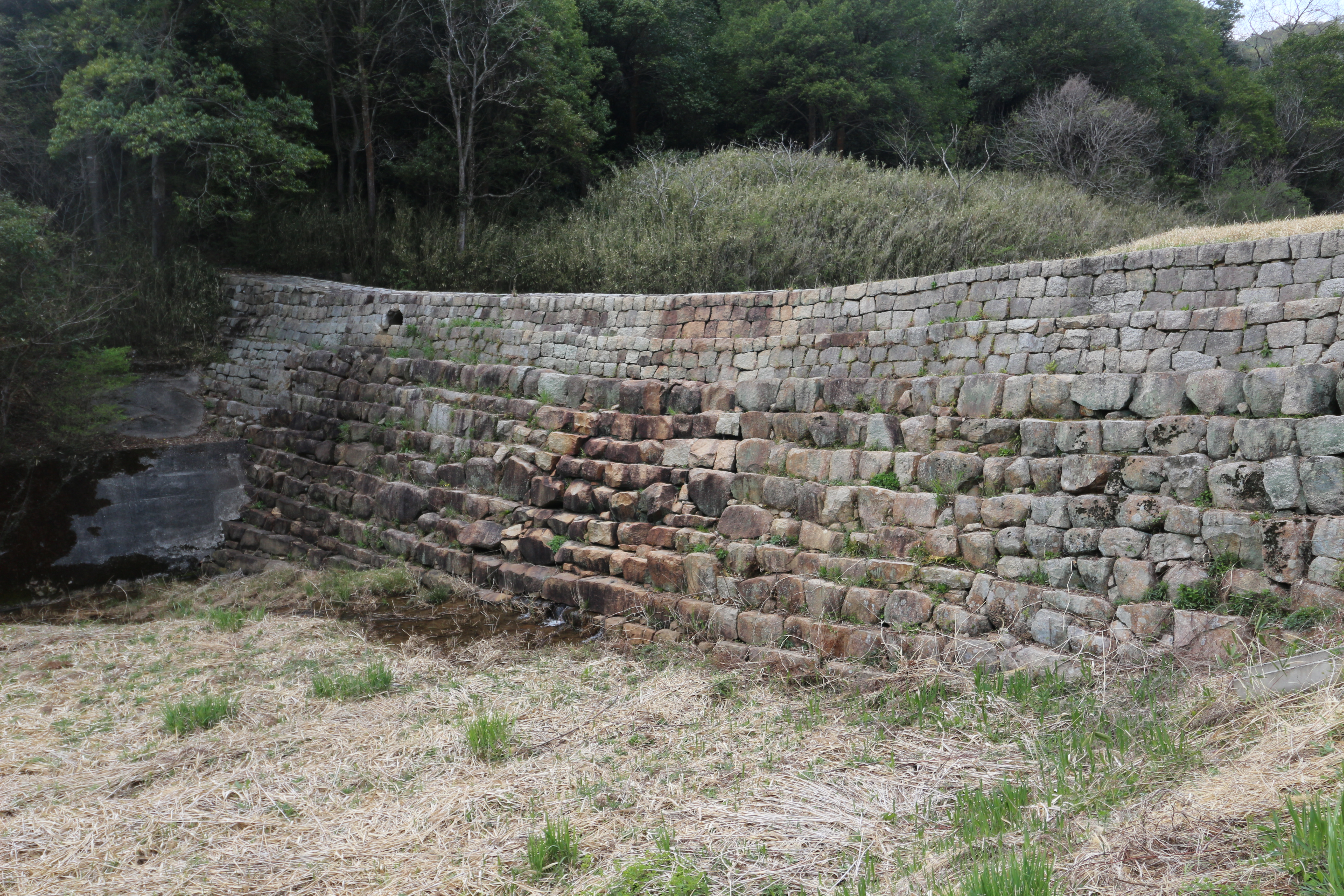 広島県福山市神辺町の堂々川3番砂留